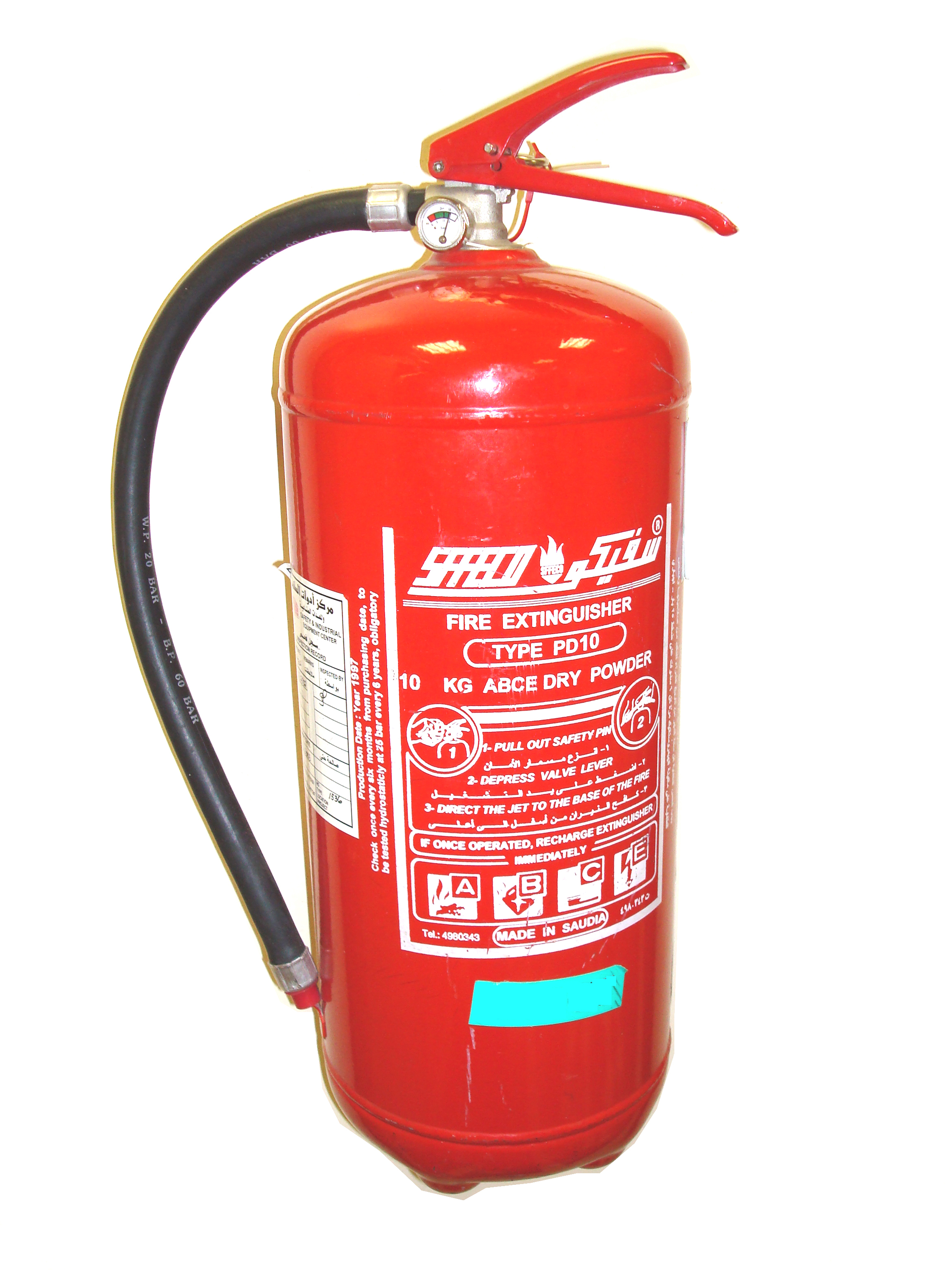 അഗ്നിശമനോപകരണം - ഫയർ എക്റ്റിംഗിഷർ